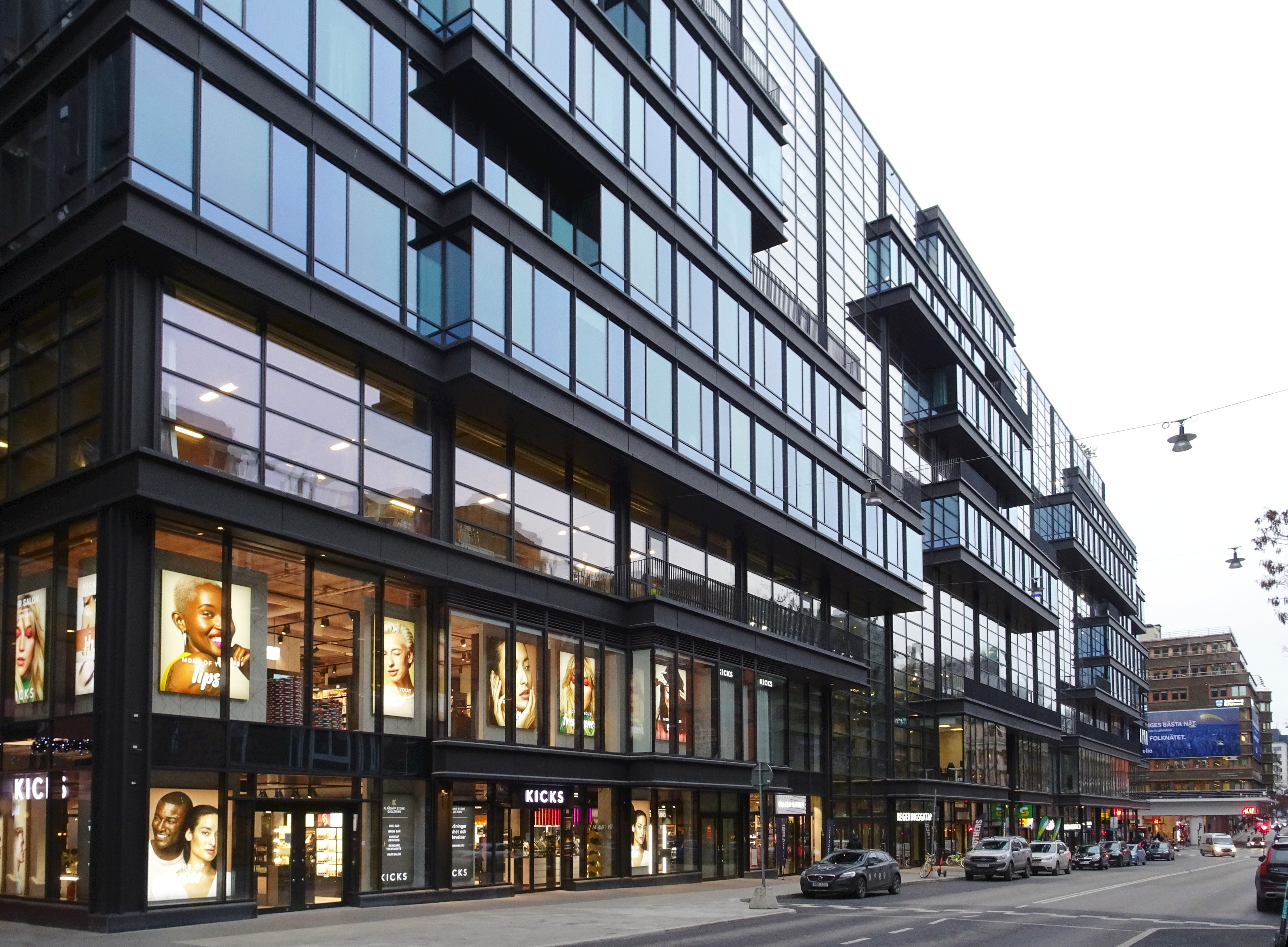 Fastigheten Trollhättan 30, Regeringsgatan 25-29, byggår 2017, arkitekt Lundgaard & Tranberg